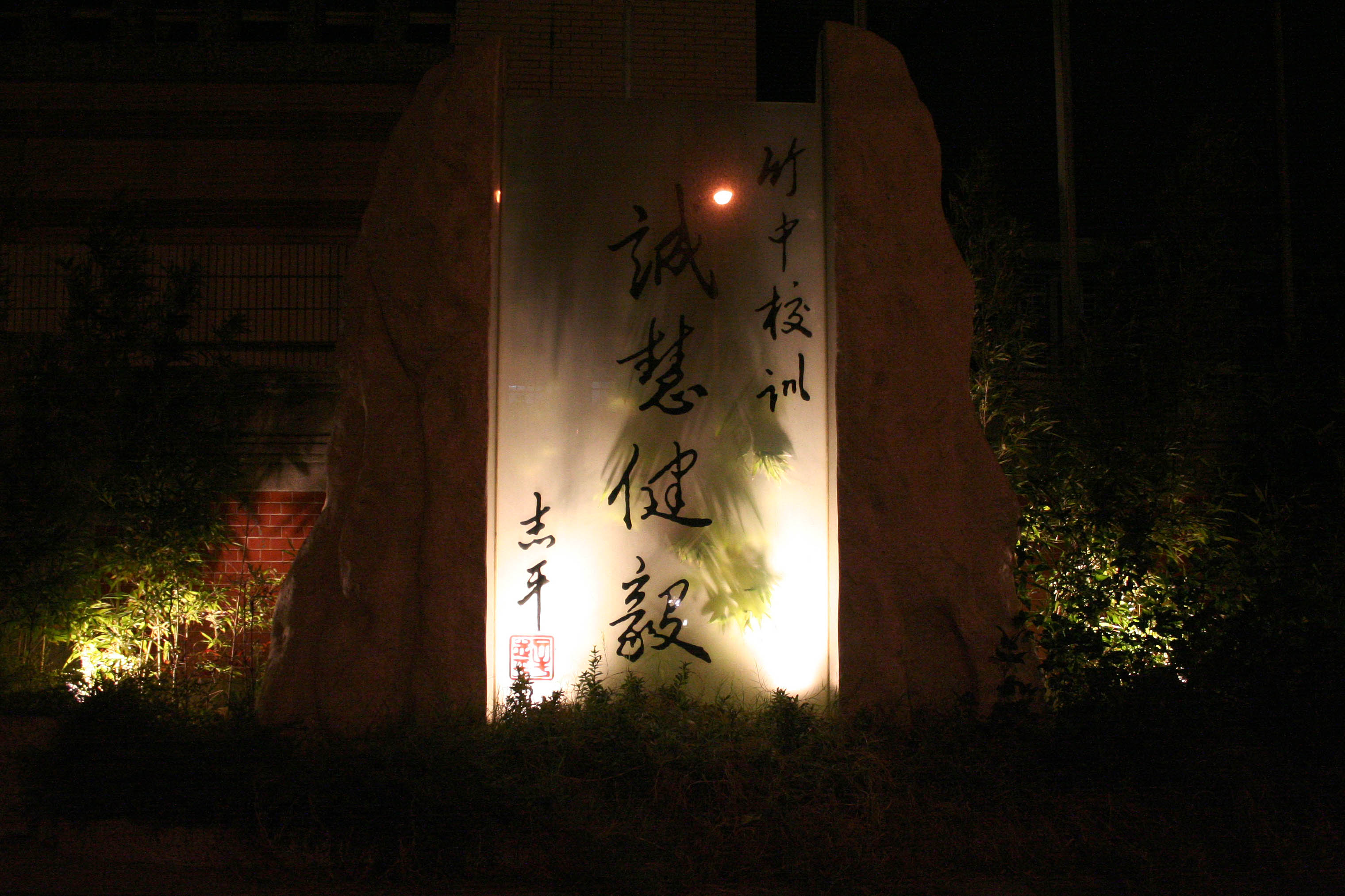 中文（台灣）: 在國立新竹高級中學校門口旁的校訓